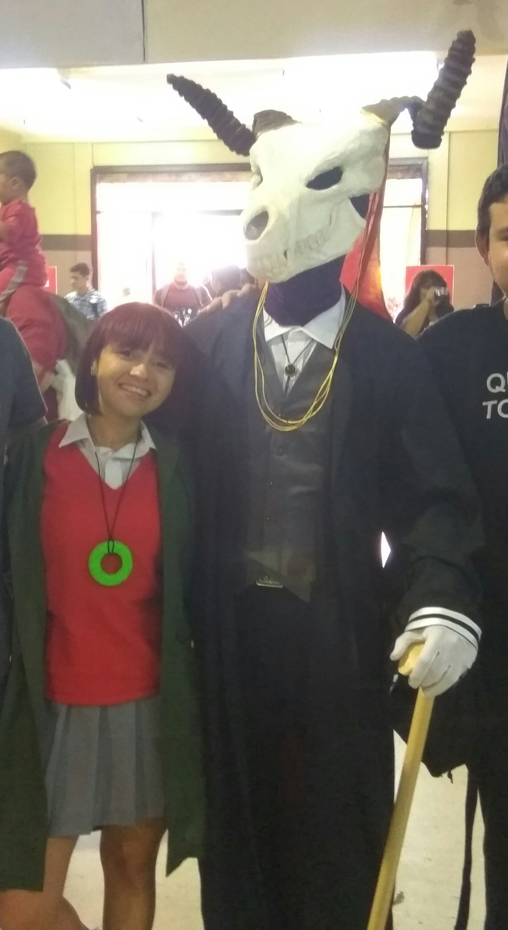 Cosplayers representando a los personajes principales del anime Mahō Tsukai no Yome.